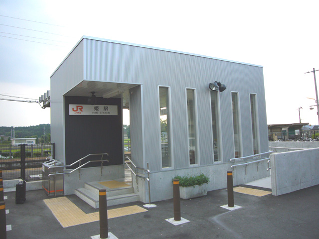 姫駅新駅舎外観（20006年8月12日に本人撮影）